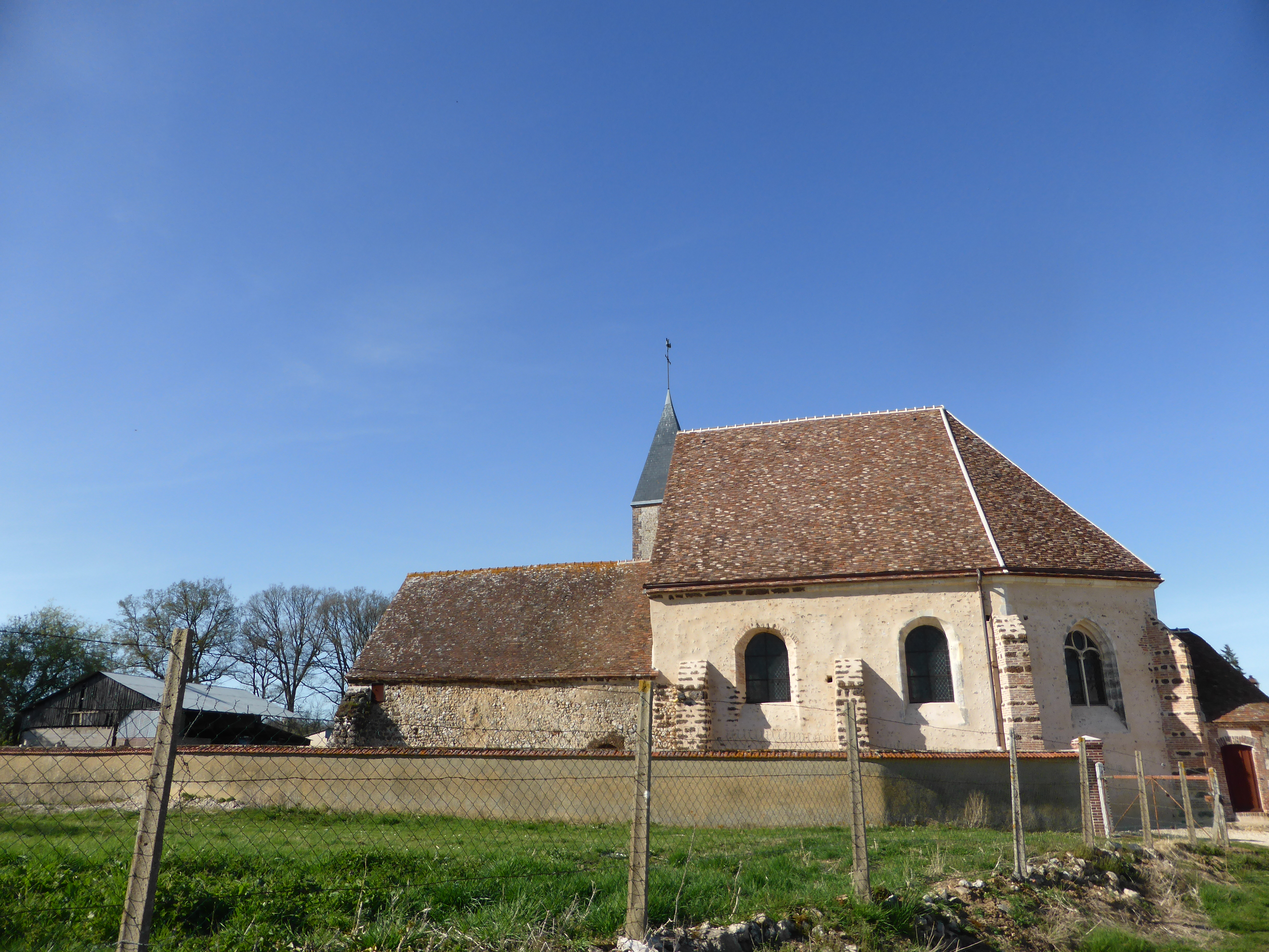 Église Saint-Jean de Saint-Jean-de-Rebervilliers, en Eure-et-Loir.